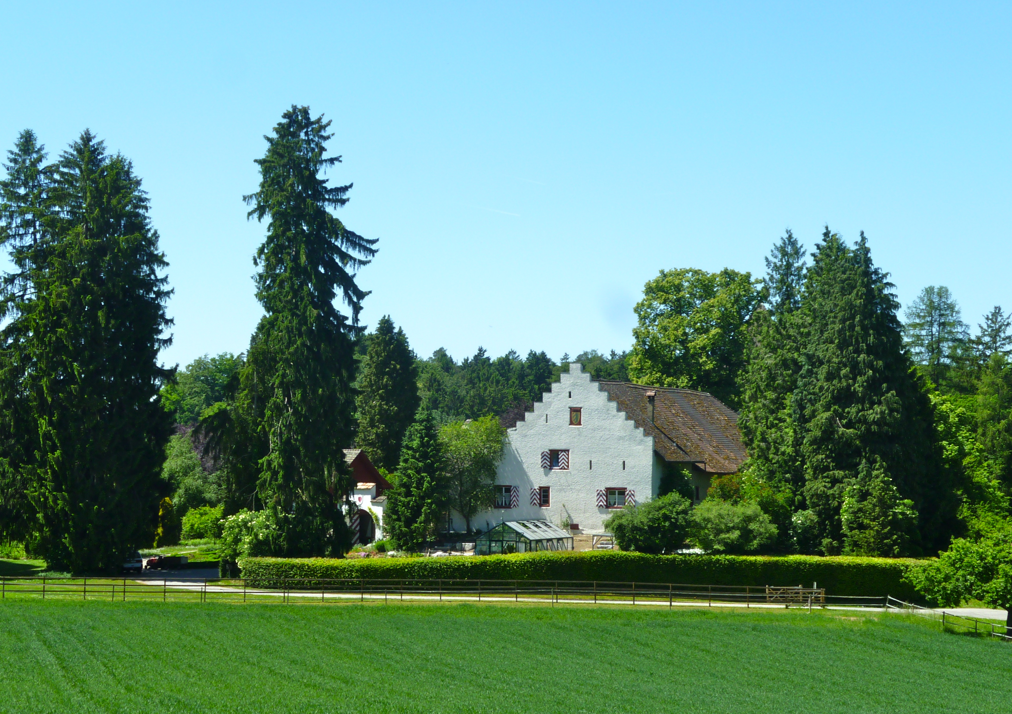 Schloss Wyden bei Ossingen ZH